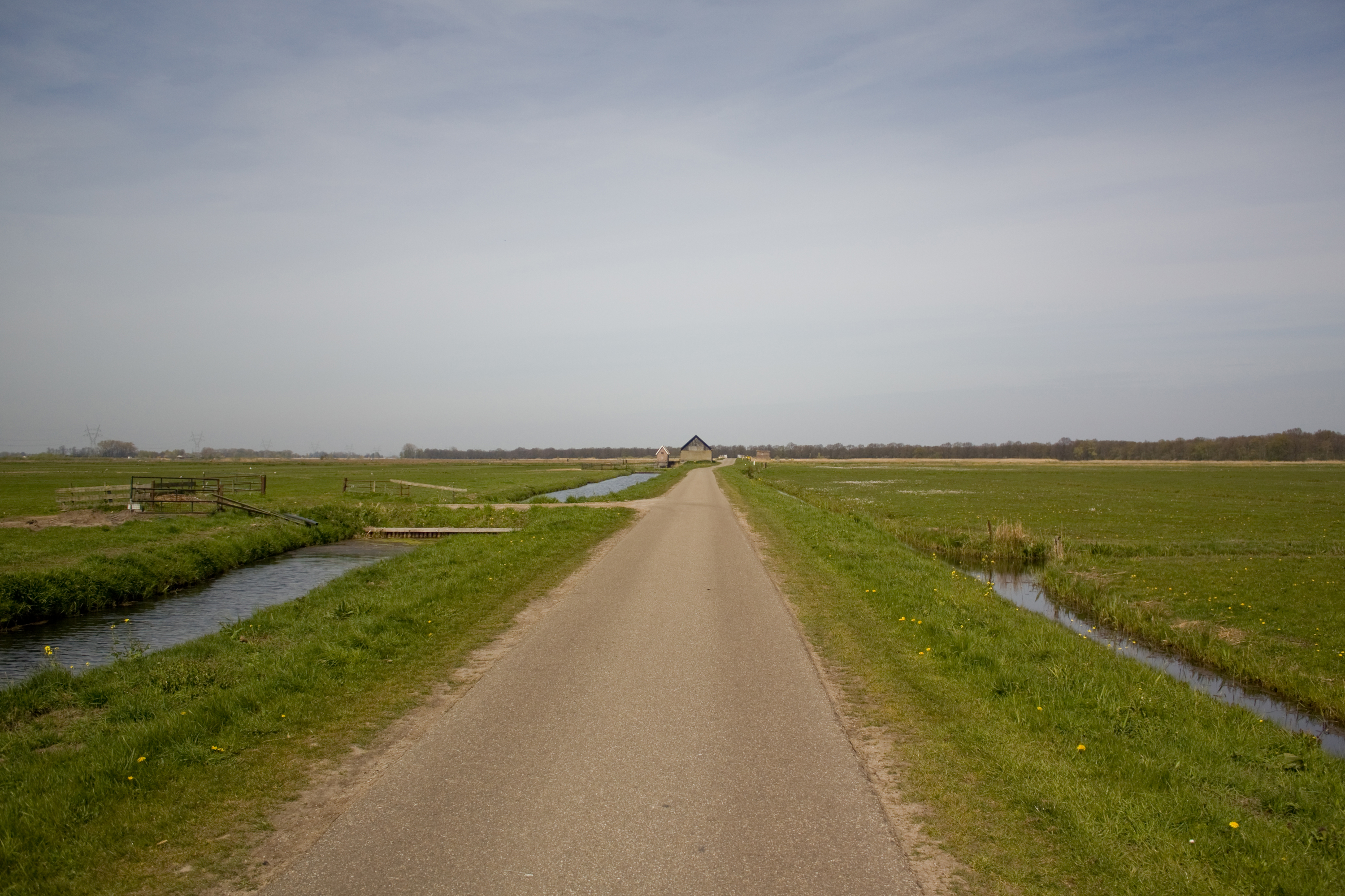 De Melkmeent met zicht op de sluis op de Karnemelksloot